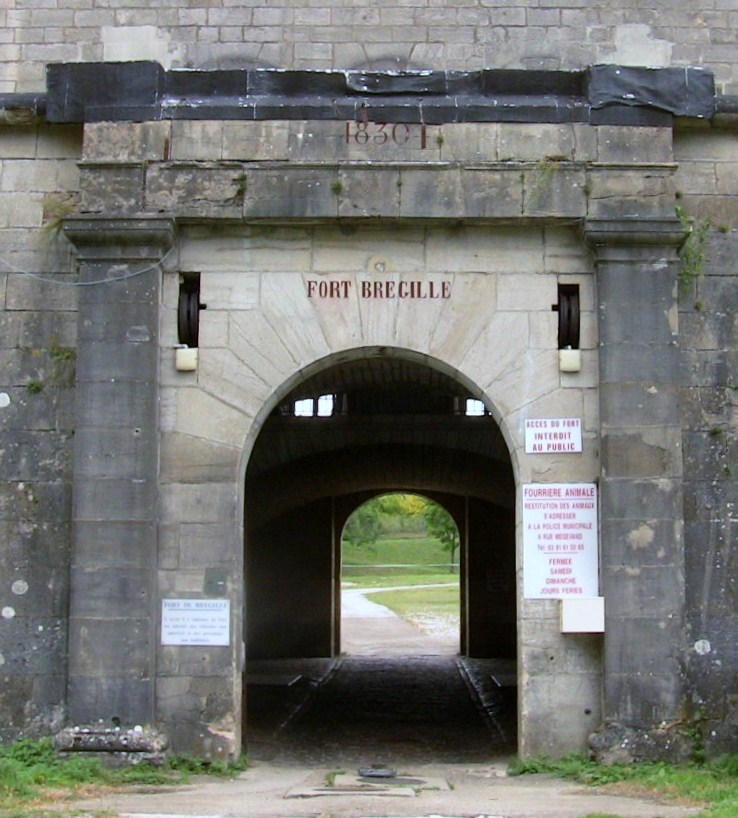 Le porche du fort de Bregille.